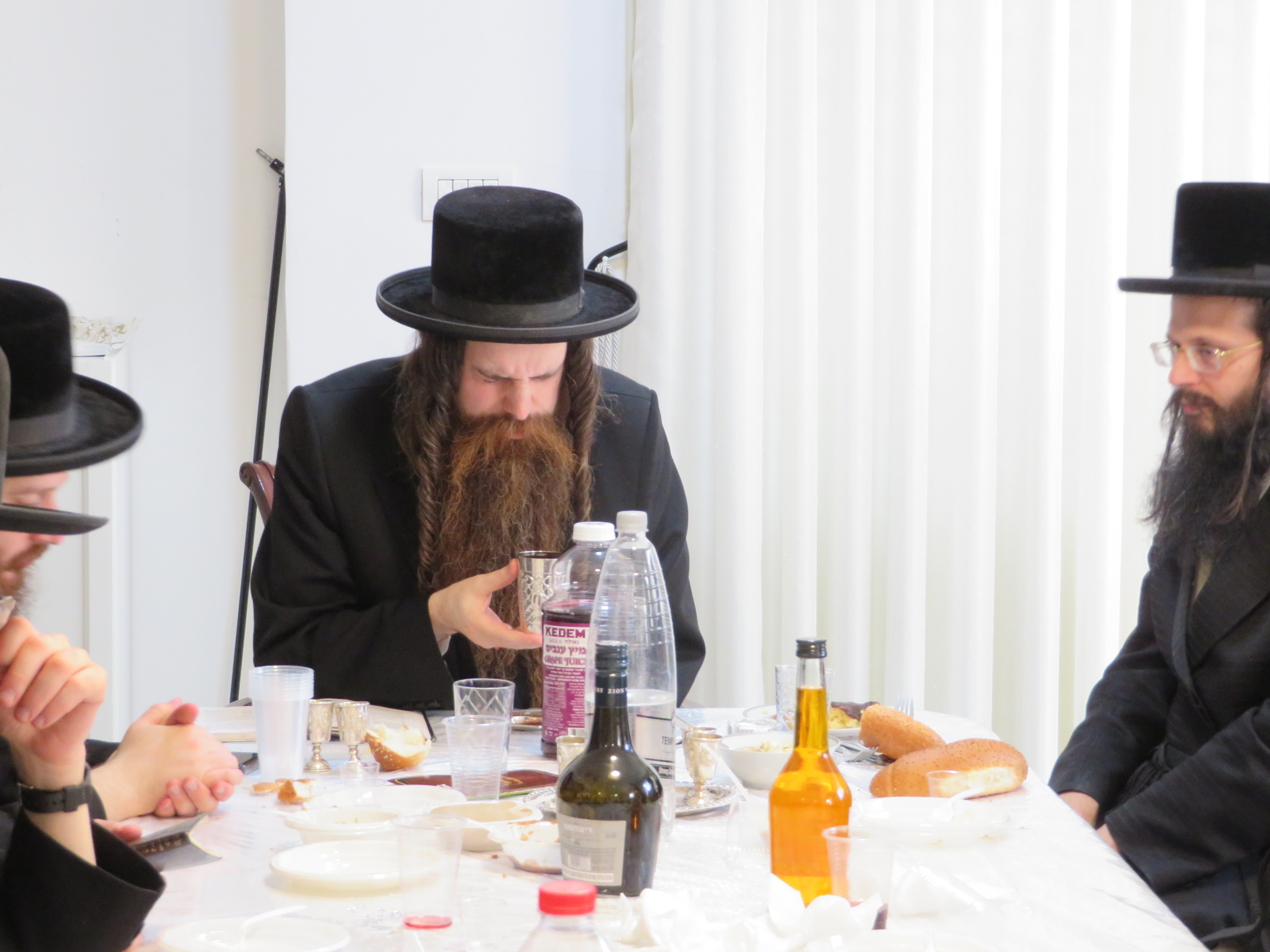 הרב מנחם קאליש, האדמו"ר מאמשינאוו שליט"א טיש ל"ג בעומר תש"פ עם הרב יחזקאל דרברמדיקר שליט"א